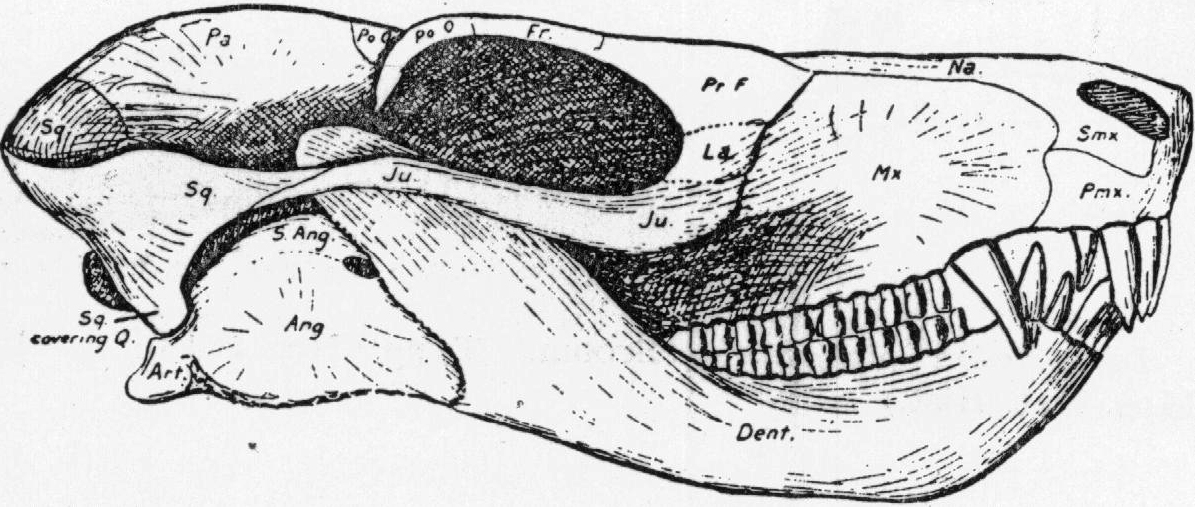 Bauria cynops skull restoration, specimen 5622